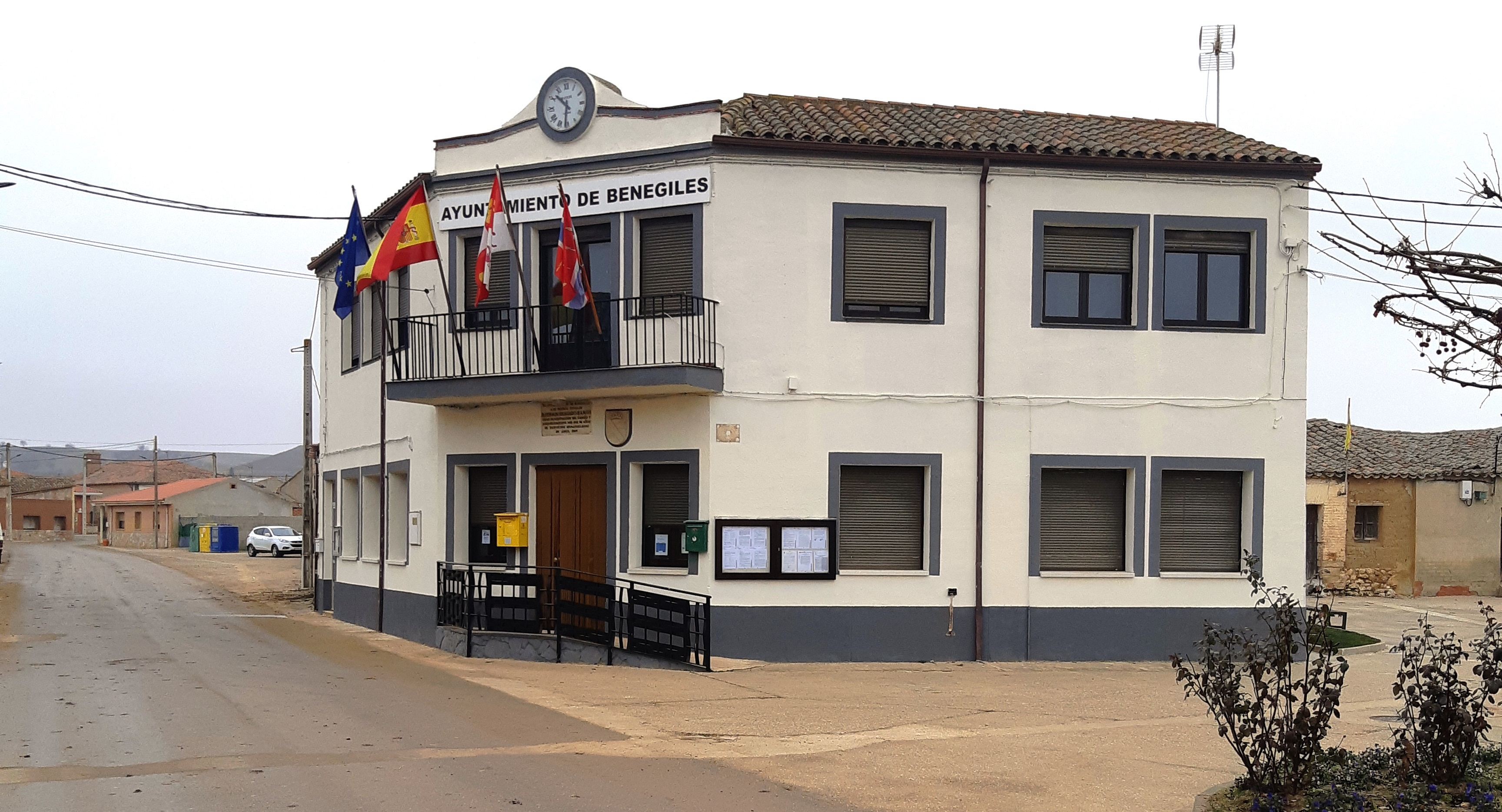 Ayuntamiento de Benegiles (2019)